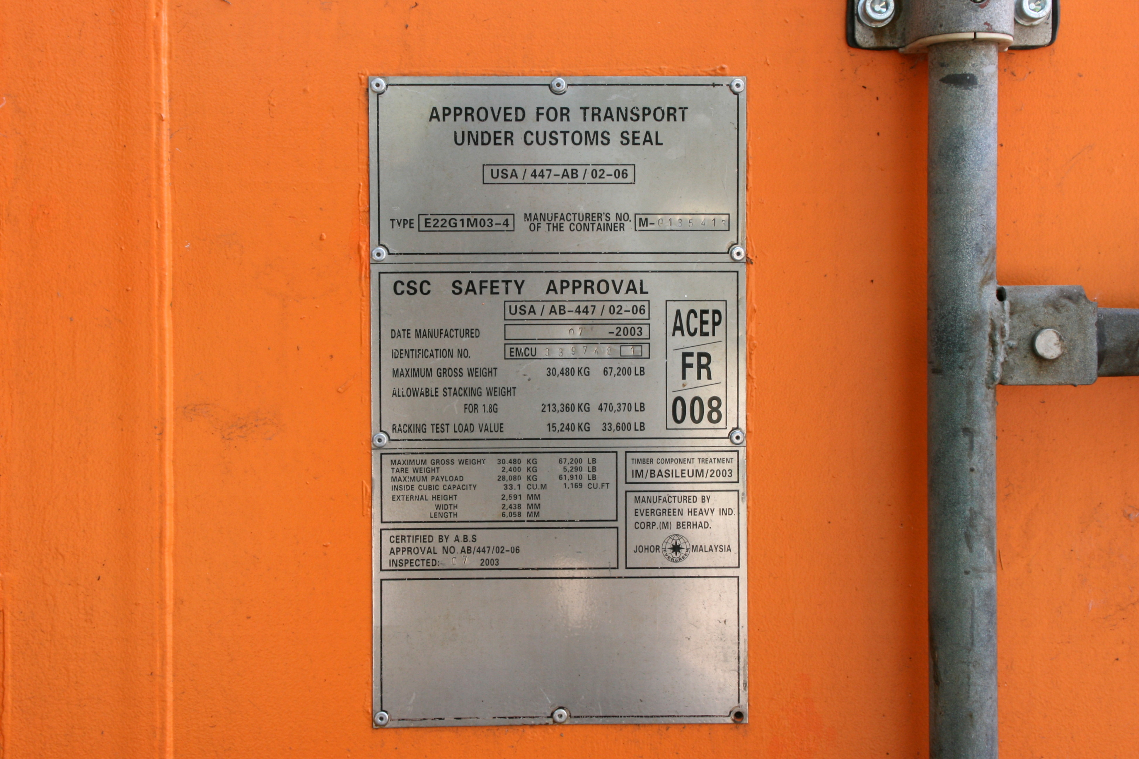 Umspannwerk Recklinghausen, Uferstraße 2-4 in Recklinghausen